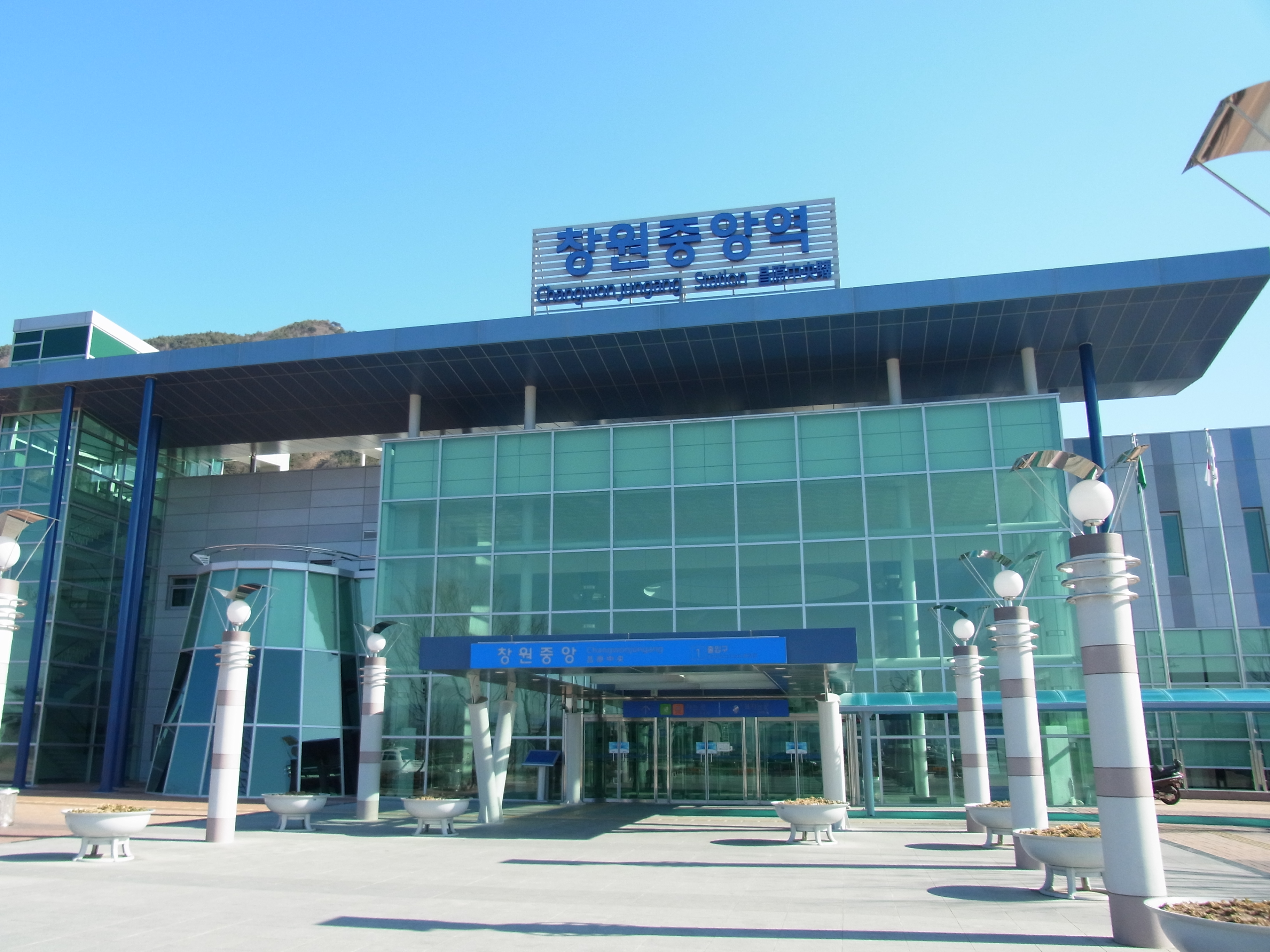 창원중앙역